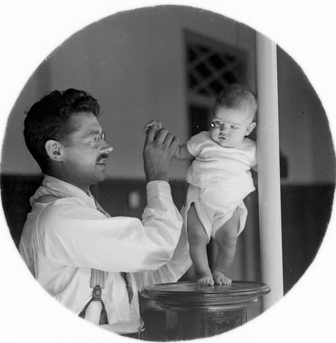 Negatief. Dr. R.A.M. Bergman met baby